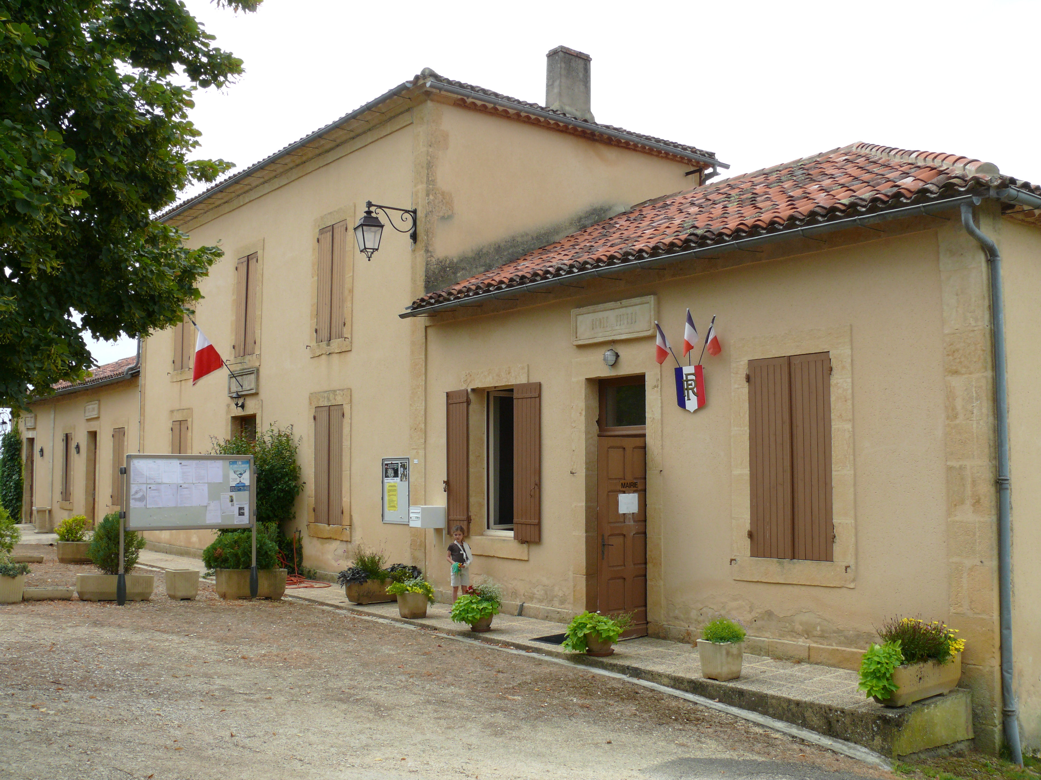 Loubejac - Mairie